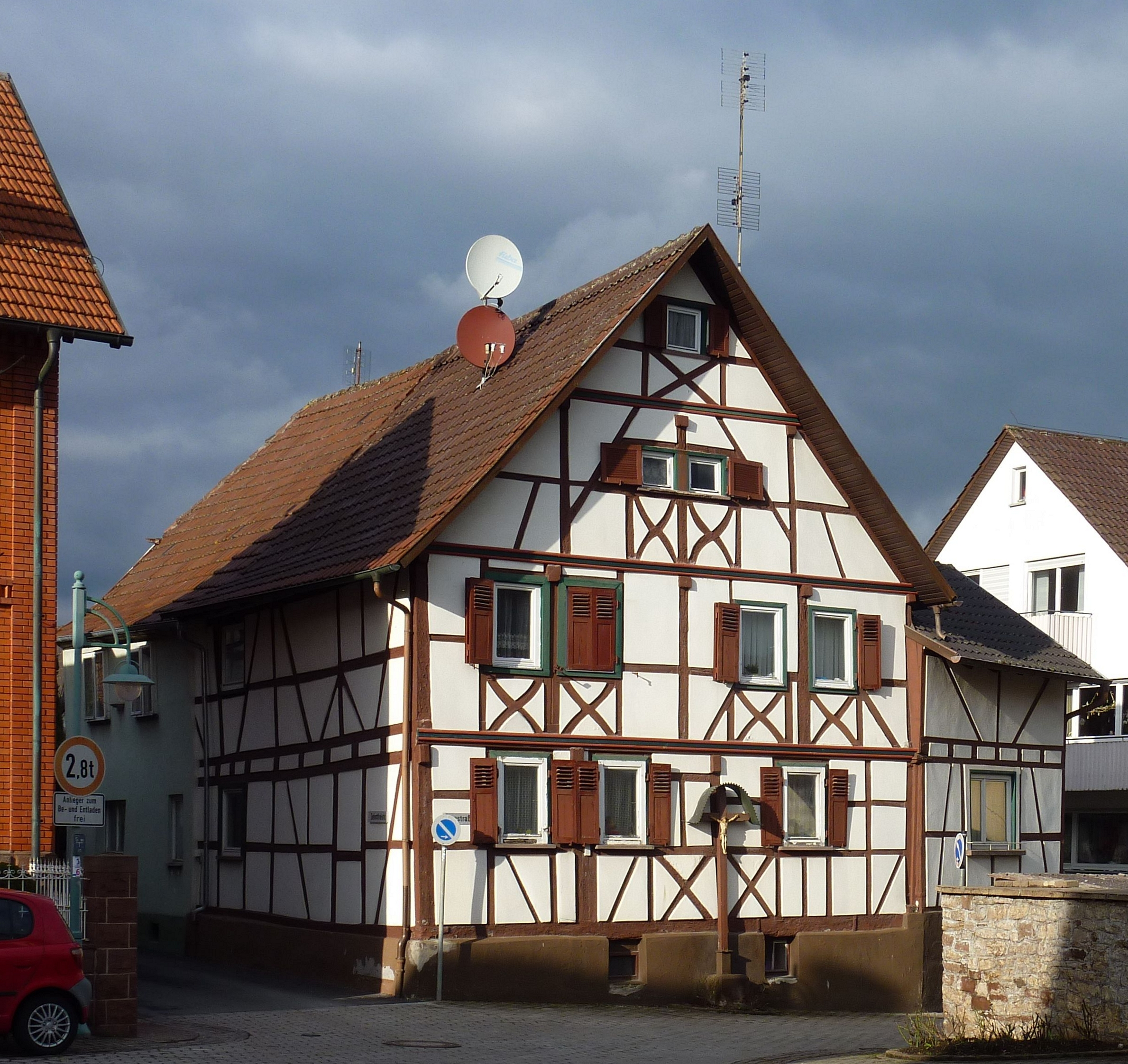 Fachwerkhaus in Dittigheim (Armstraße 16), dahinter ein direkt angrenzendes Haus (Zehntfreistraße 2).